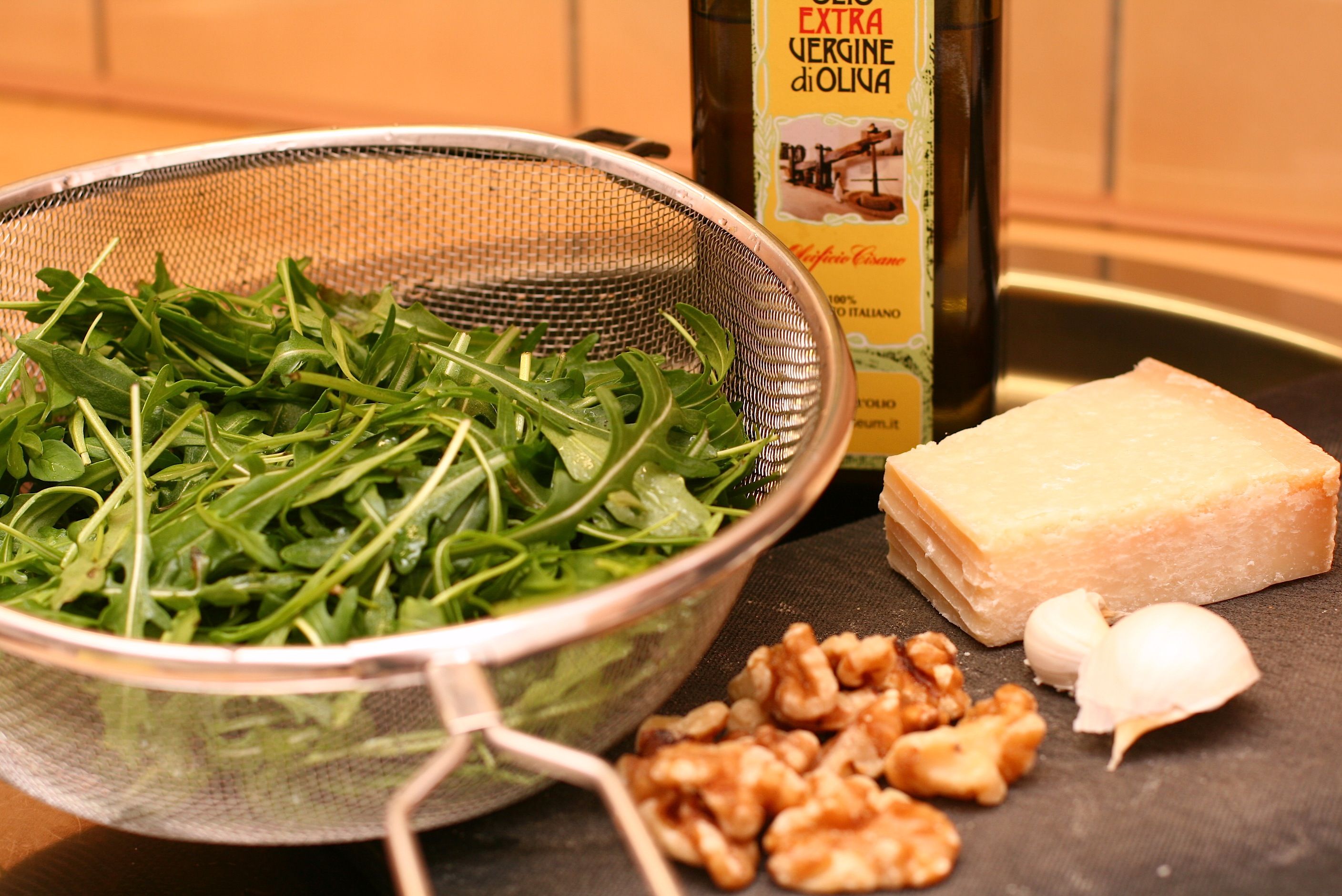 Die Zutaten: Rucola-Pesto mit Walnüssen, Knoblauch, Olivenöl, Parmesan Rezept hier